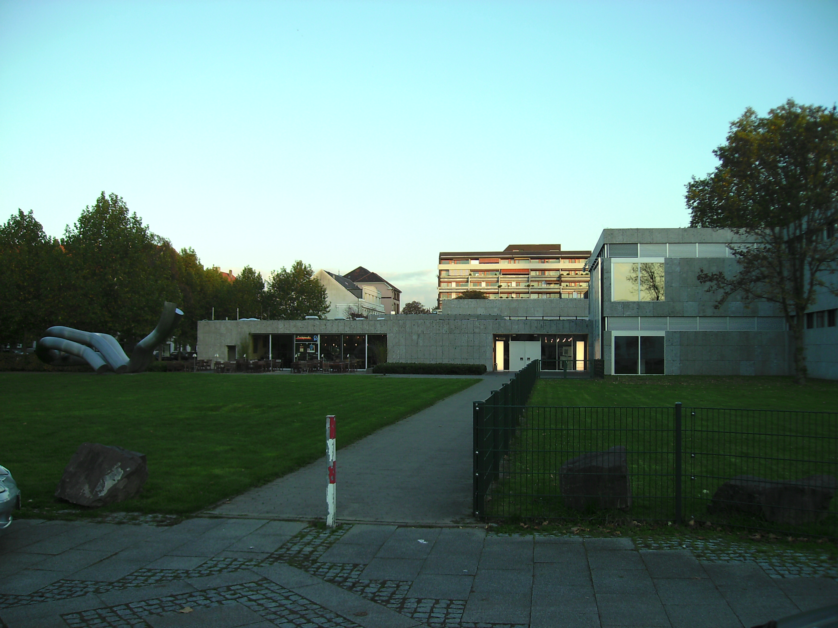 Saarlandmuseum: Moderne Galerie with sculpture Große Gaia (1984) by Maschinsky-Denninghoff